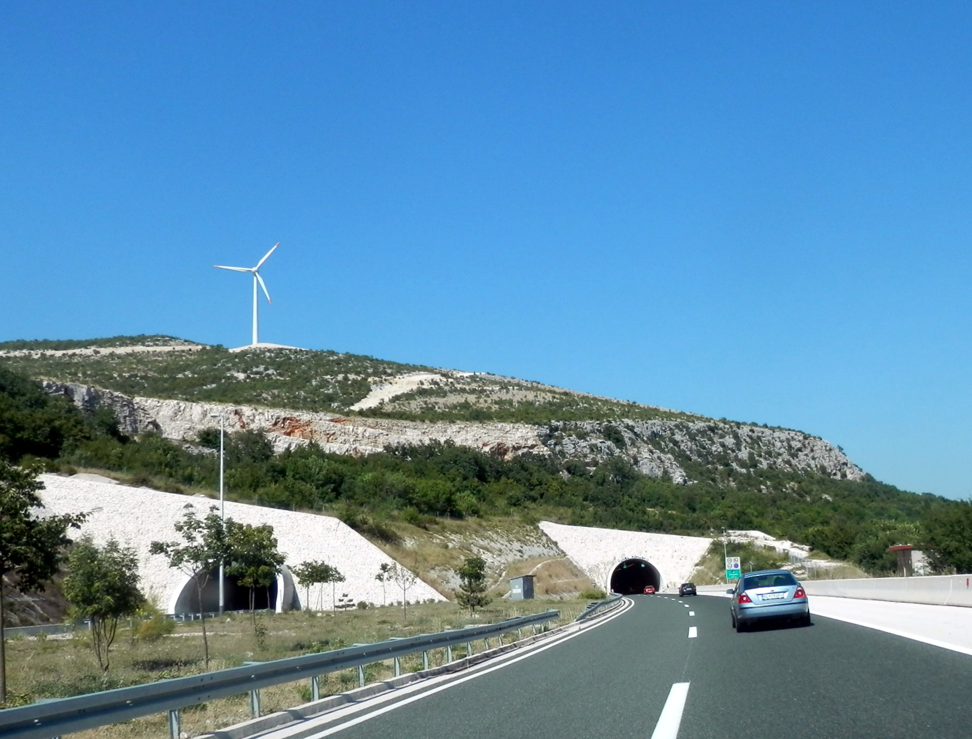 "Konjsko " Tunell. Diaľnica A1 v Chorvátsku.Leto 2013.